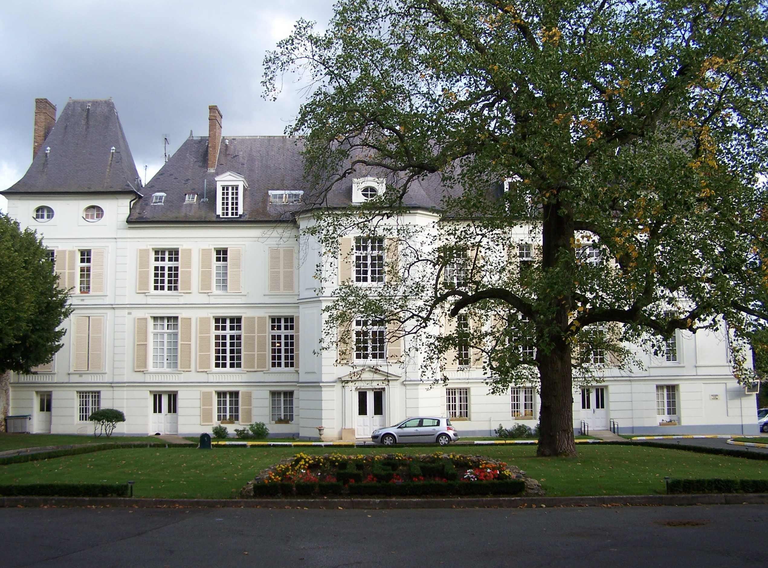 Château de Bailly (Yvelines, France)